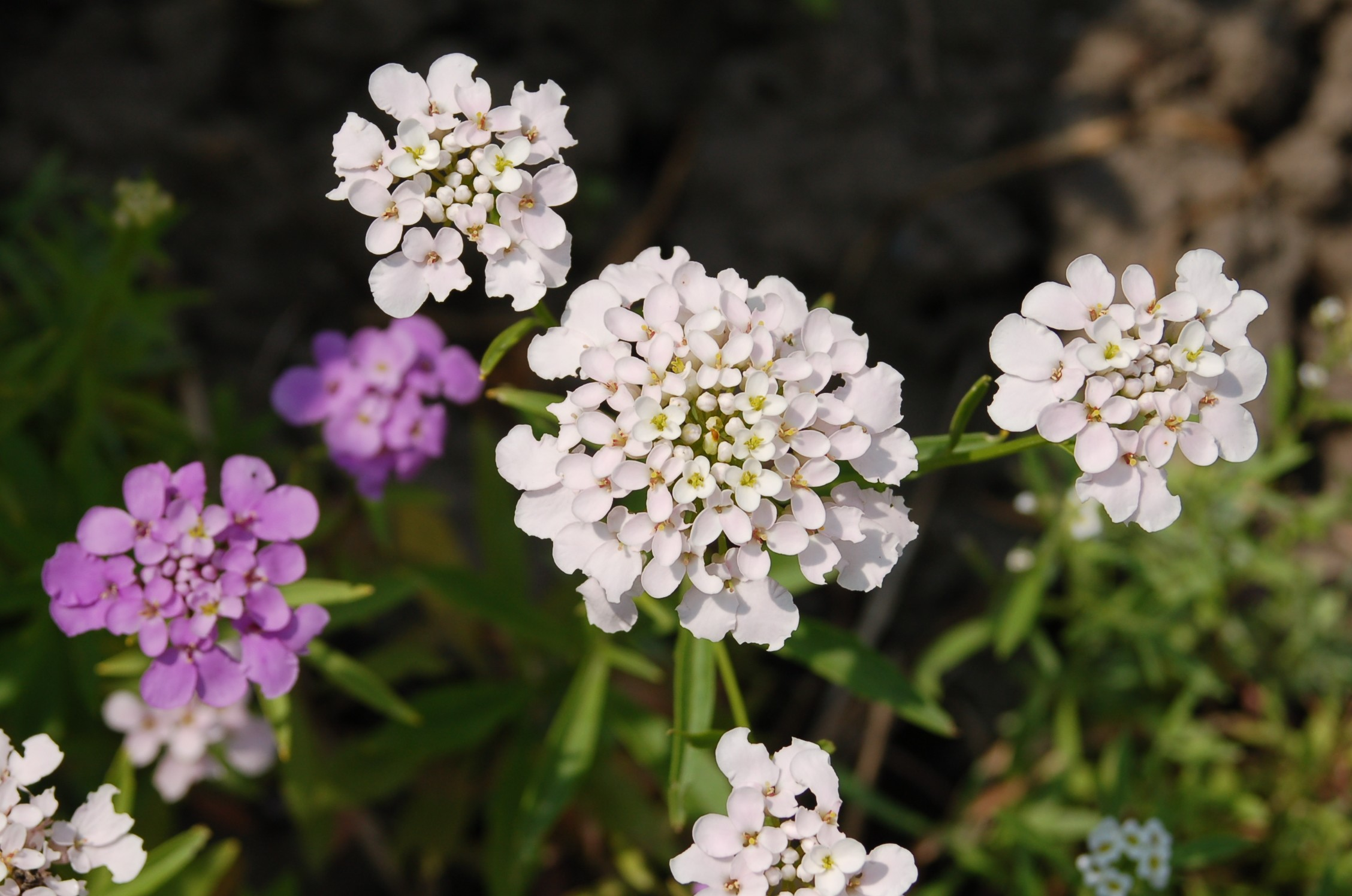 Doldige Schleifenblume, Iberis umbellata, weiß und violett